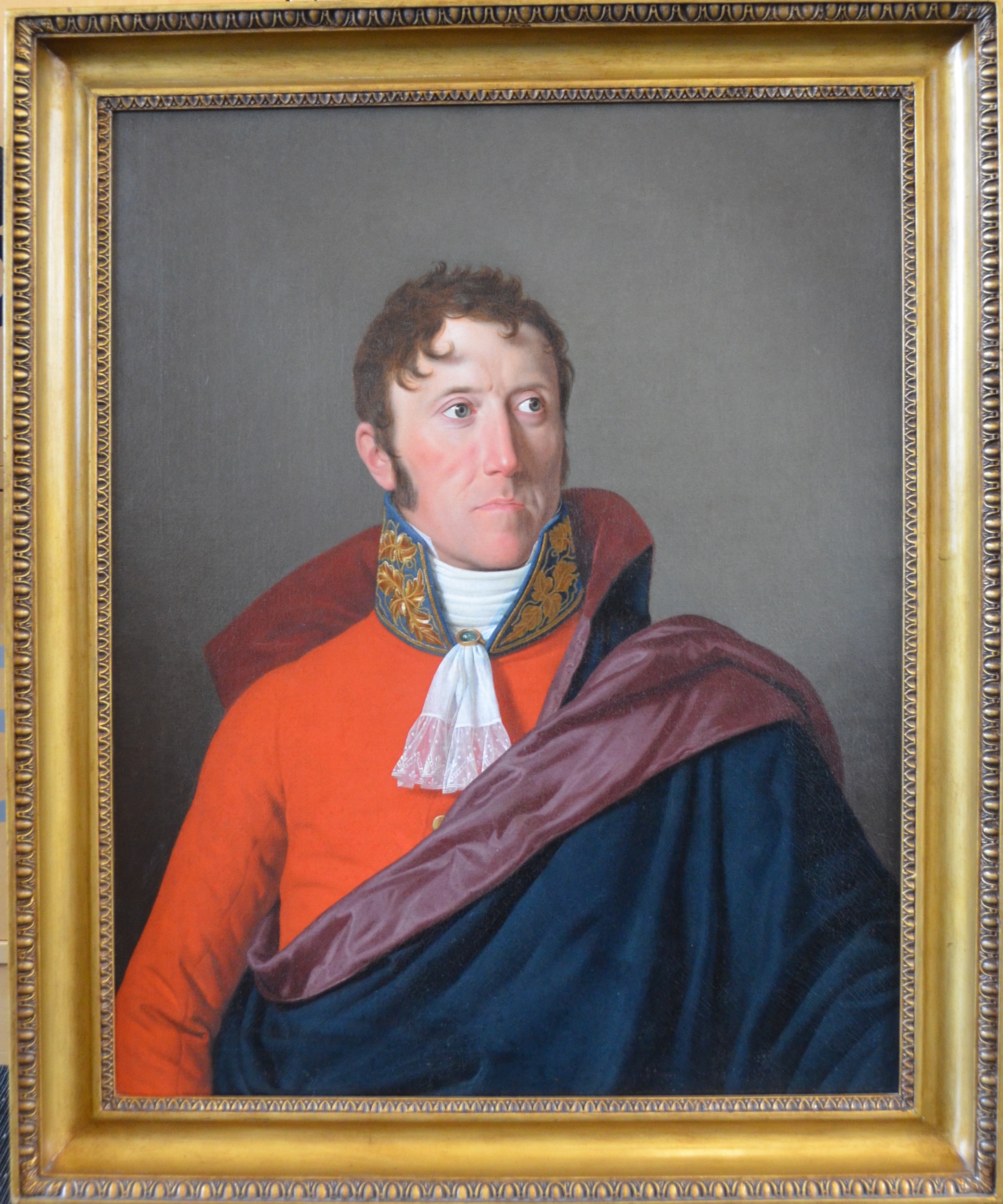 Olie på lærred, 76,5 x 61 cm.